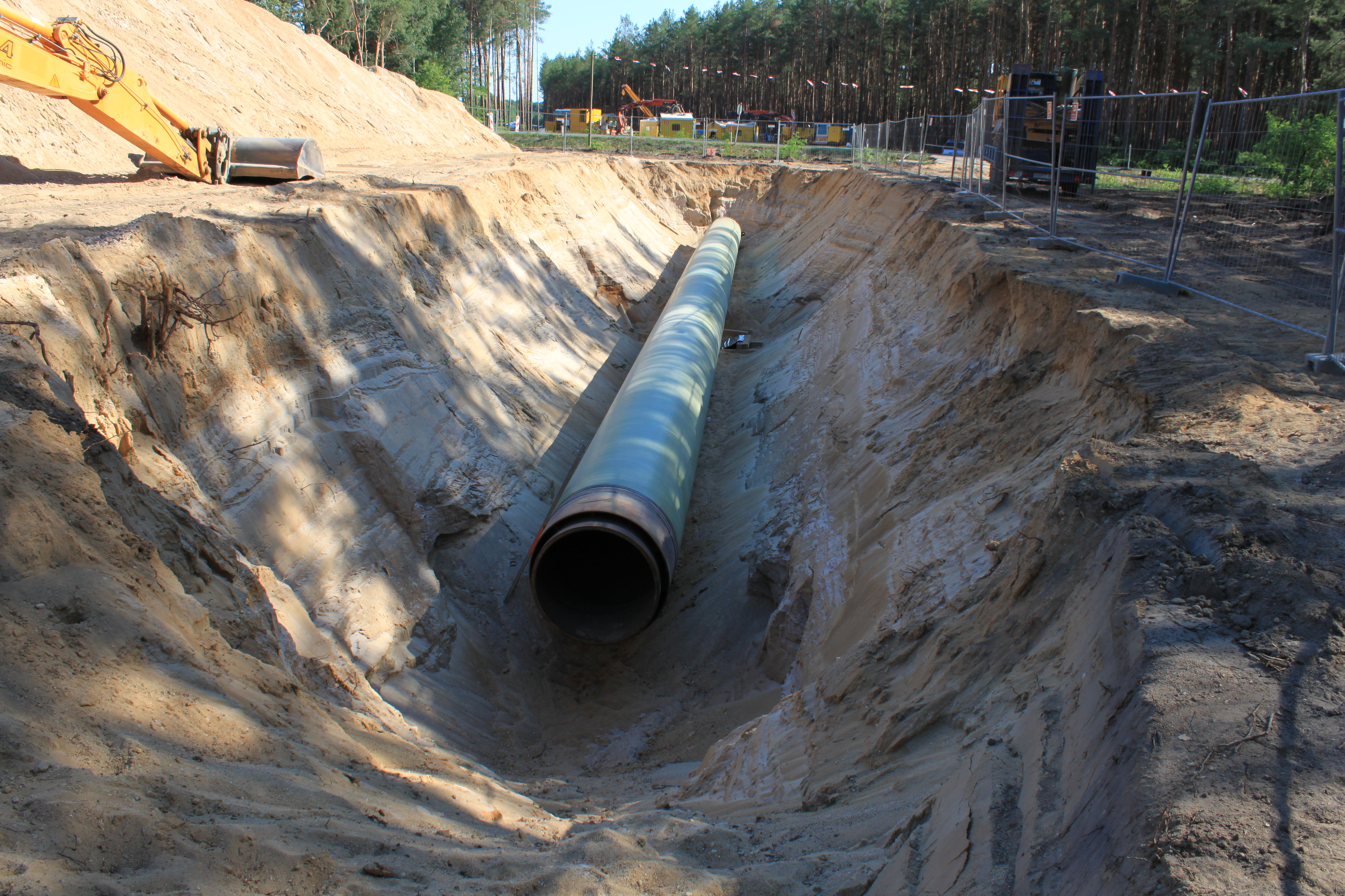 Ostsee-Pipeline-Anbindungsleitung (OPAL) bei Finsterwalde